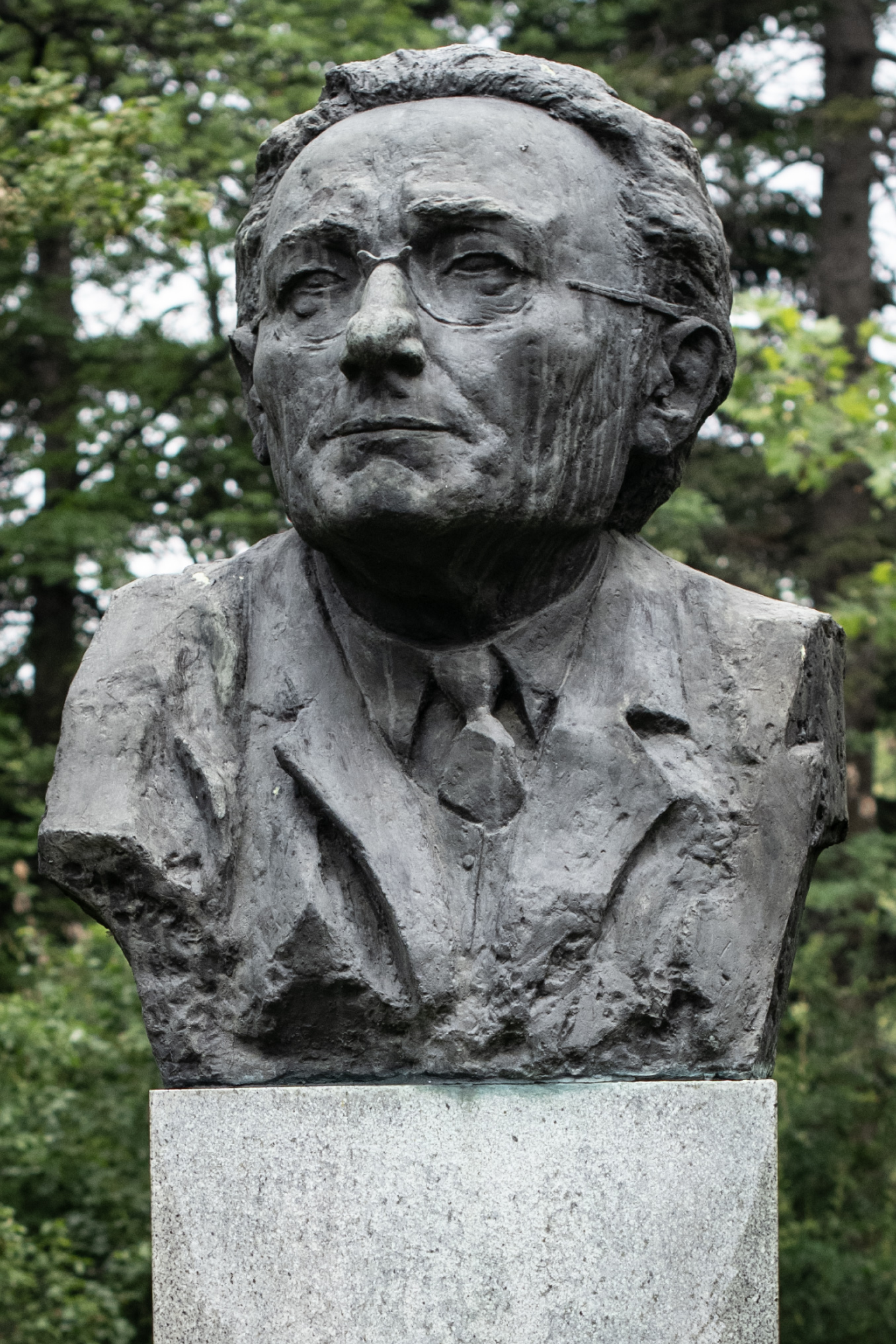 Снимката документира паметника на Емилиян Станев в парк "Борисова градина", София